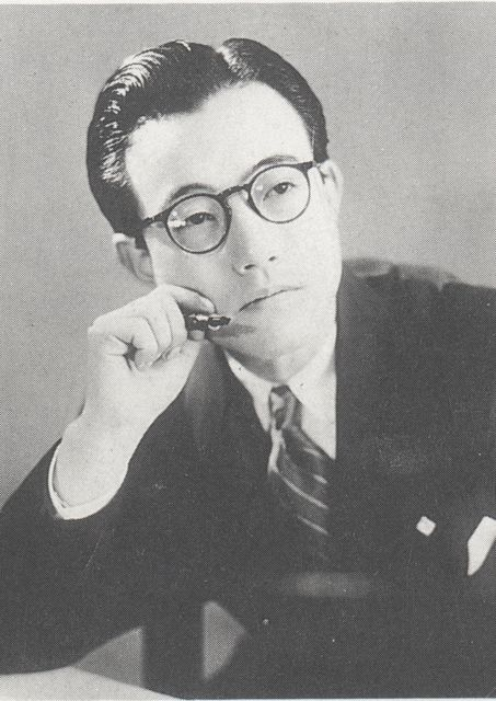 1940年代のブロマイドをスキャン